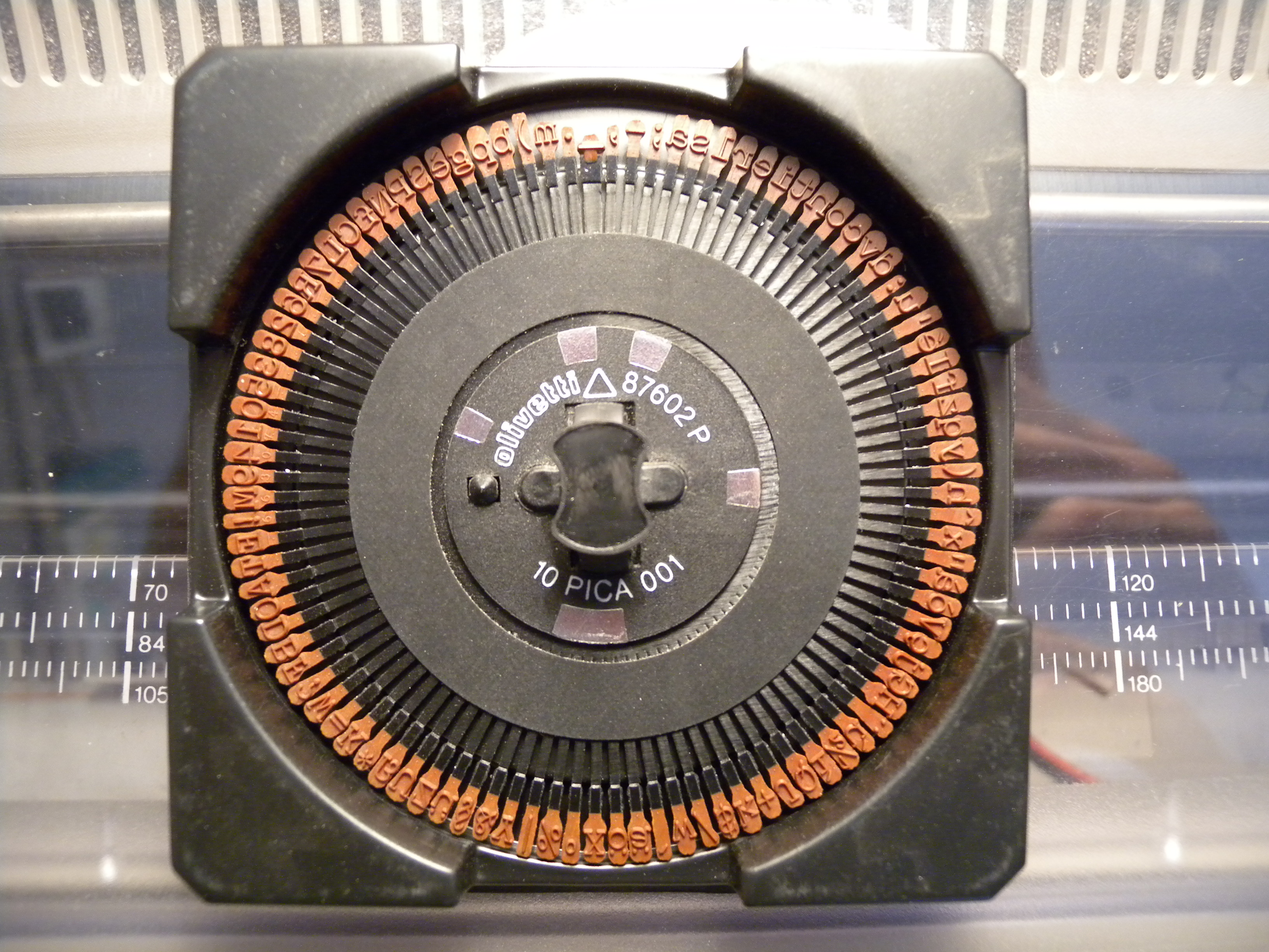 Margherita intercambiabile della macchina da scrivere Olivetti ET 2500